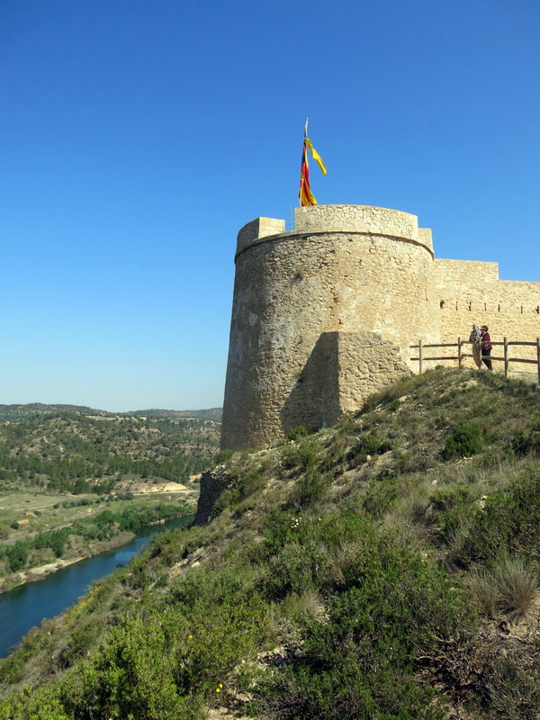 Castell de Flix a la Ribera d'Ebre - Catalunya